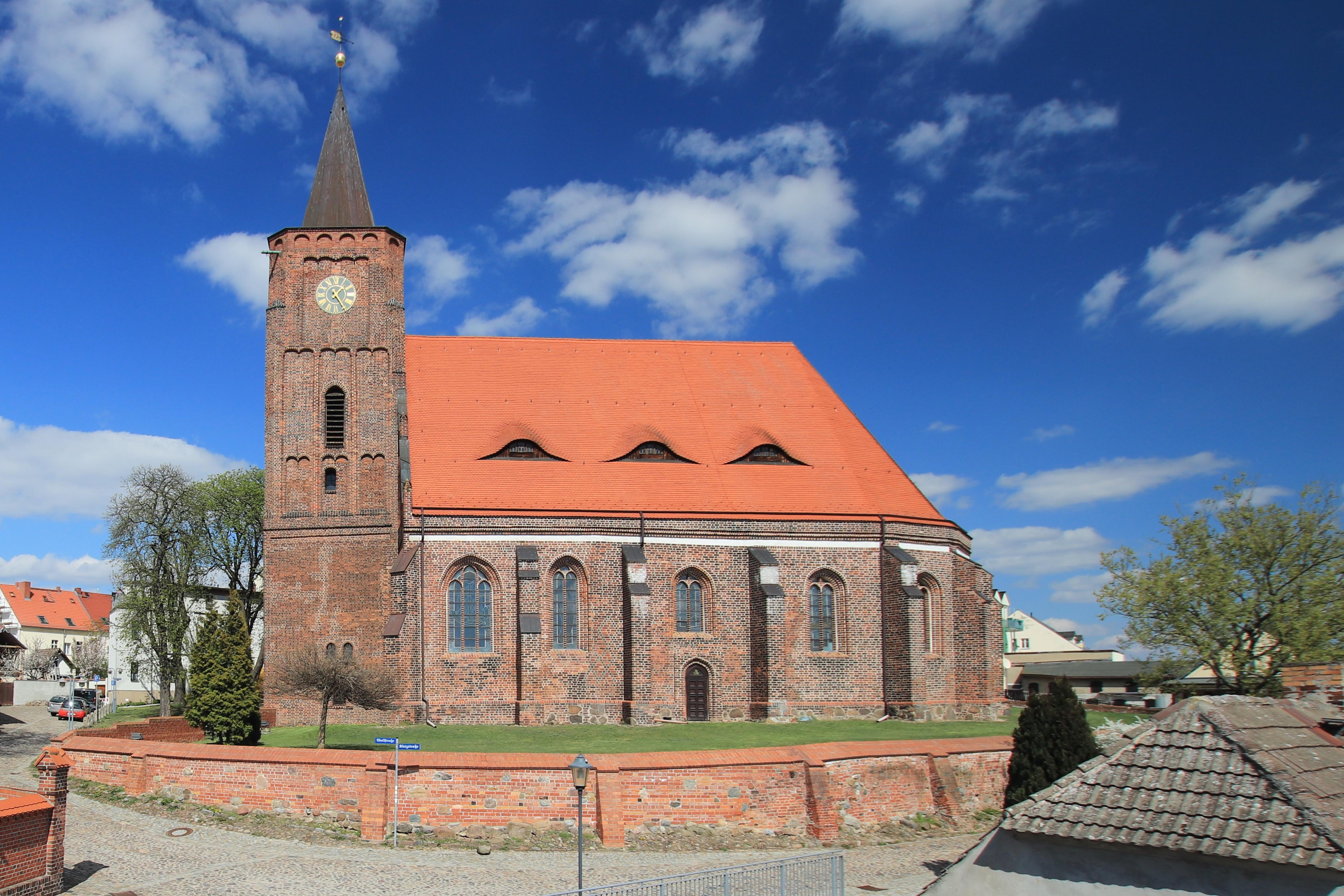 Evangelische Stadtkirche St. Nikolai, gesehen von der Alten Brückenstraße 6